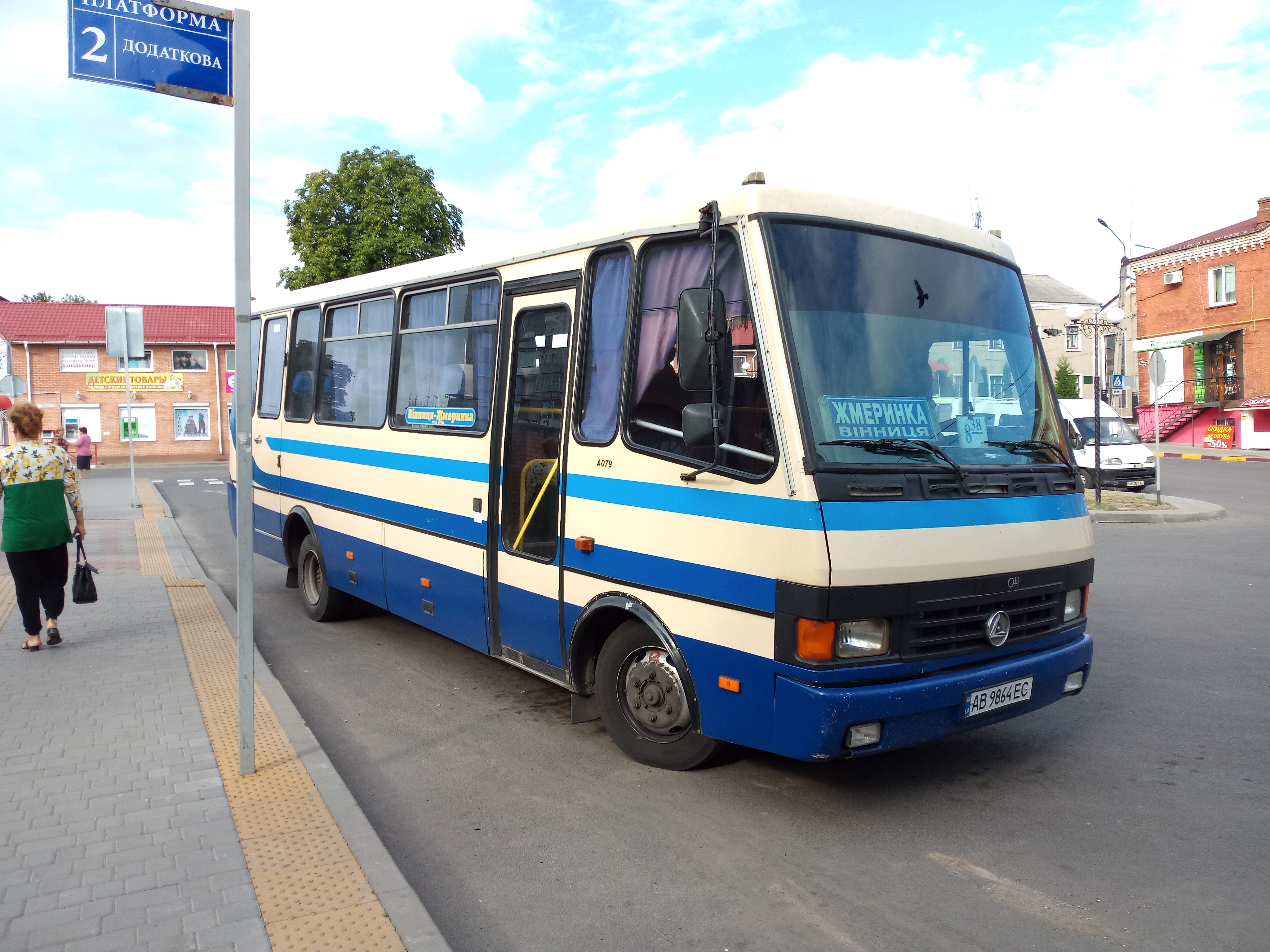 БАЗ А079.34 "Мальва" до Вінниці на вулиці Грушевського, що у Жмеринці, Вінницька область